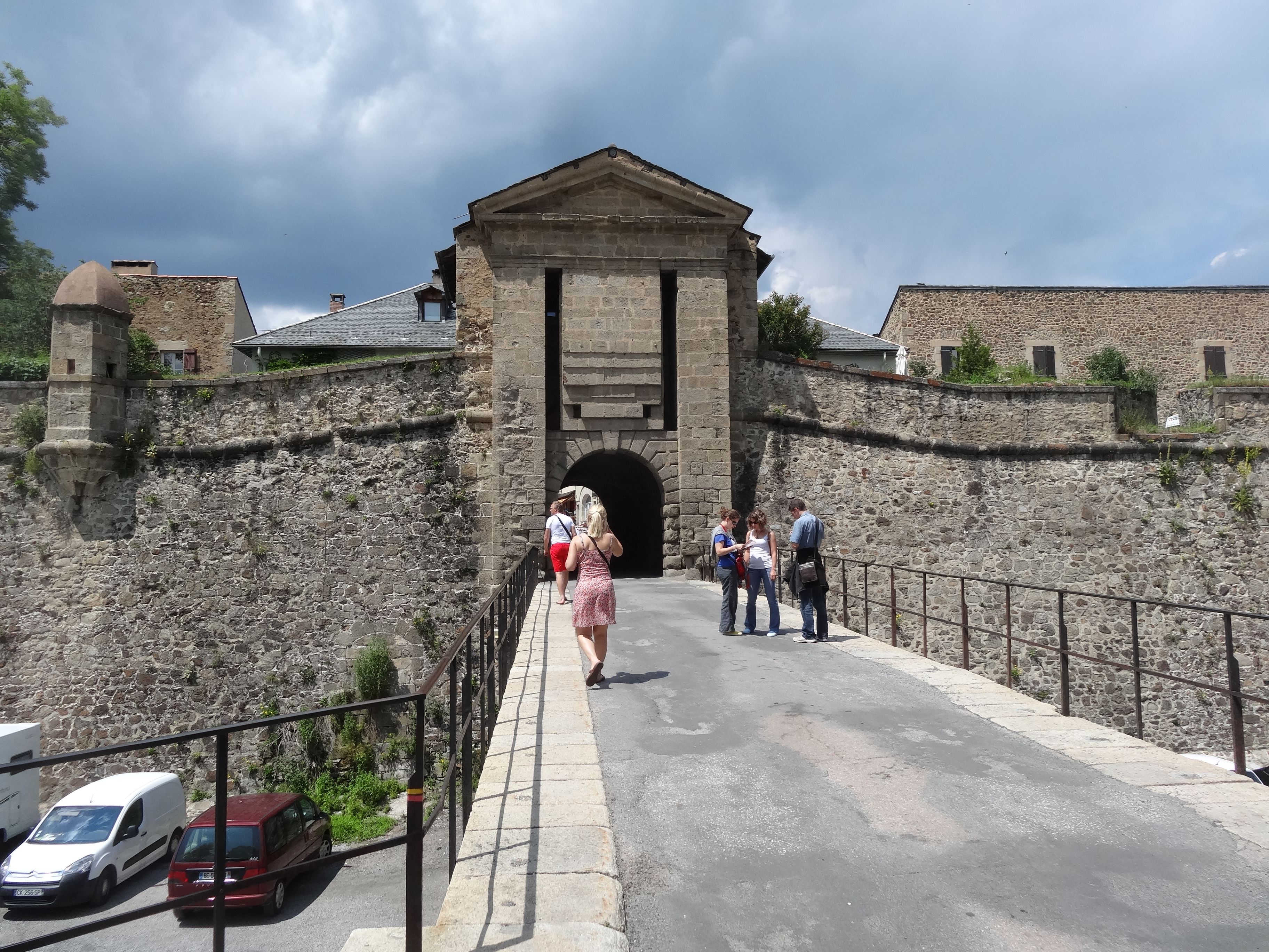 Entrada a Montlluís (juliol 2013)